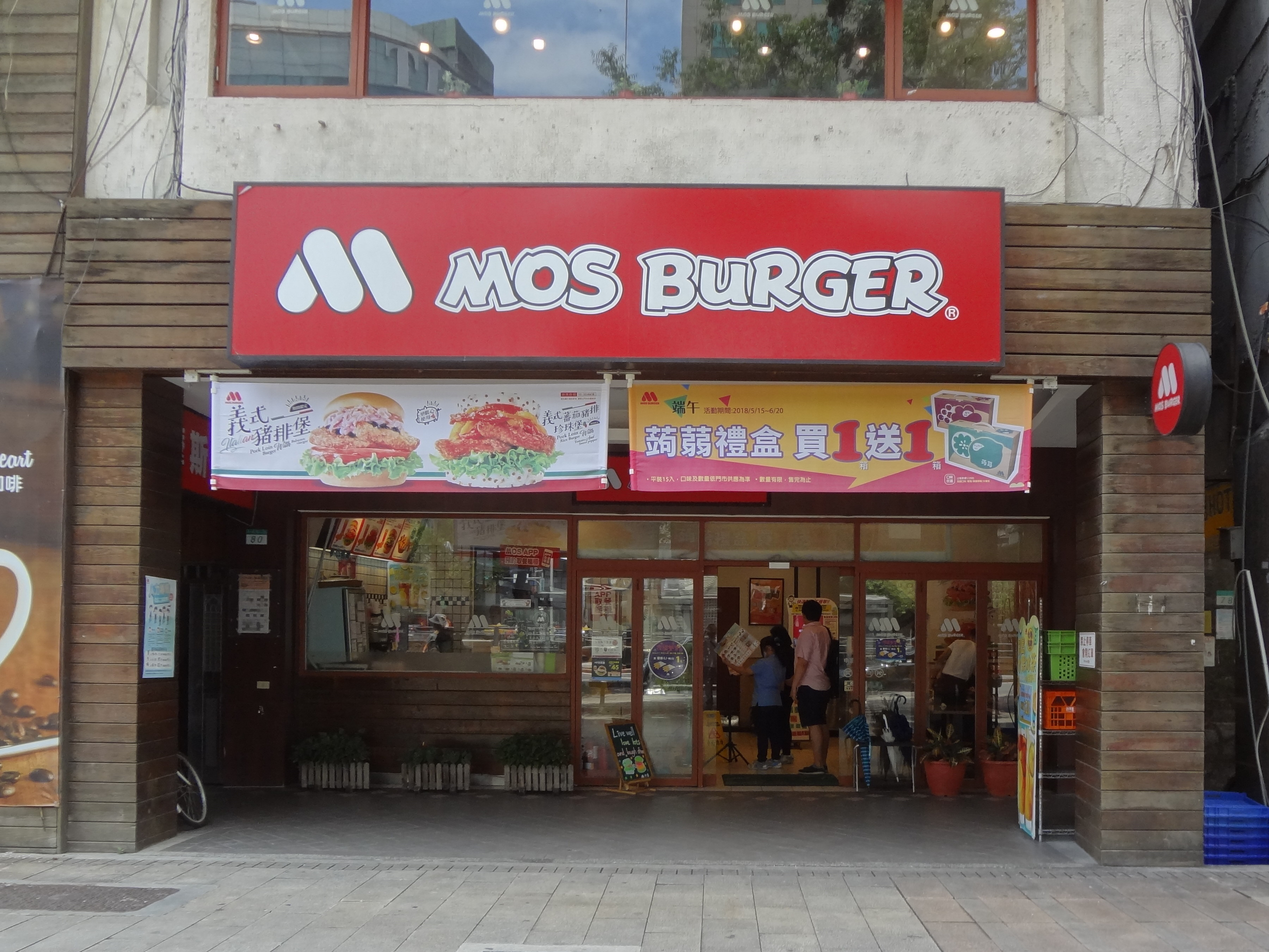 中文（台灣）: 摩斯漢堡中華店，位於臺北市萬華區中華路一段80號1至2樓。